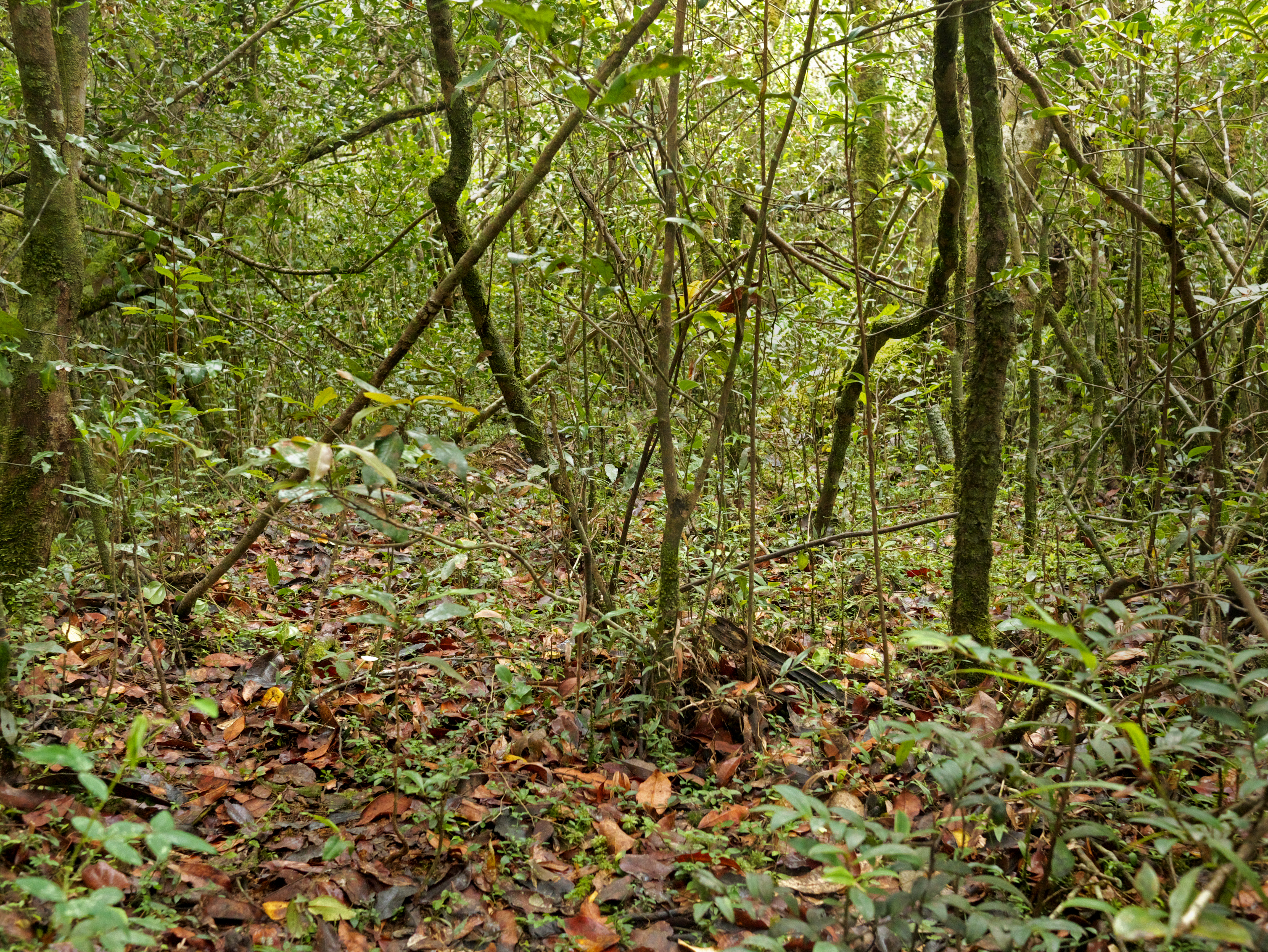 Panasonic GX7 + Panasonic Lumix G 20mm f1.7 lens